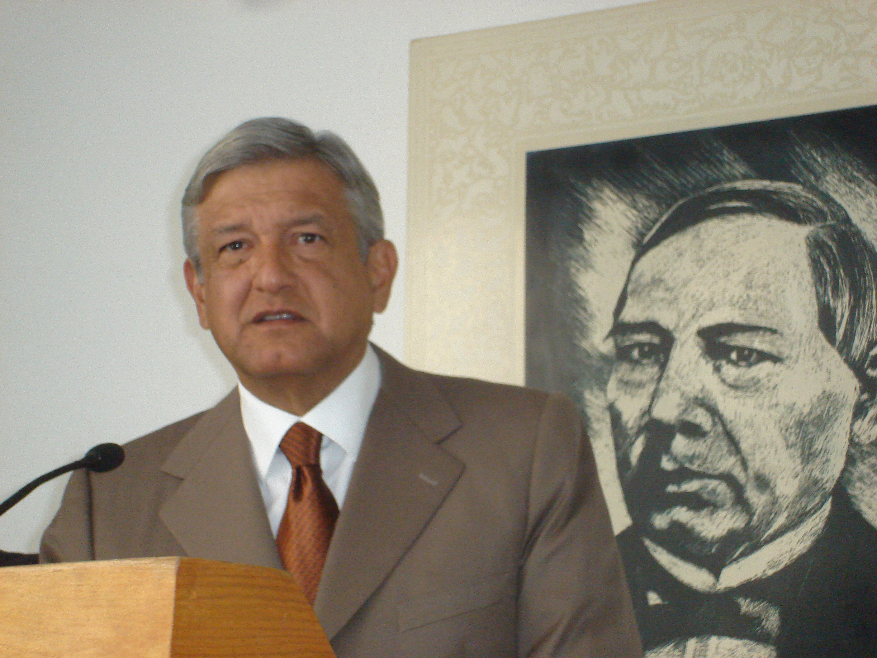 Andres Manuel Lopez Obrador, the self-described "legitimate president."